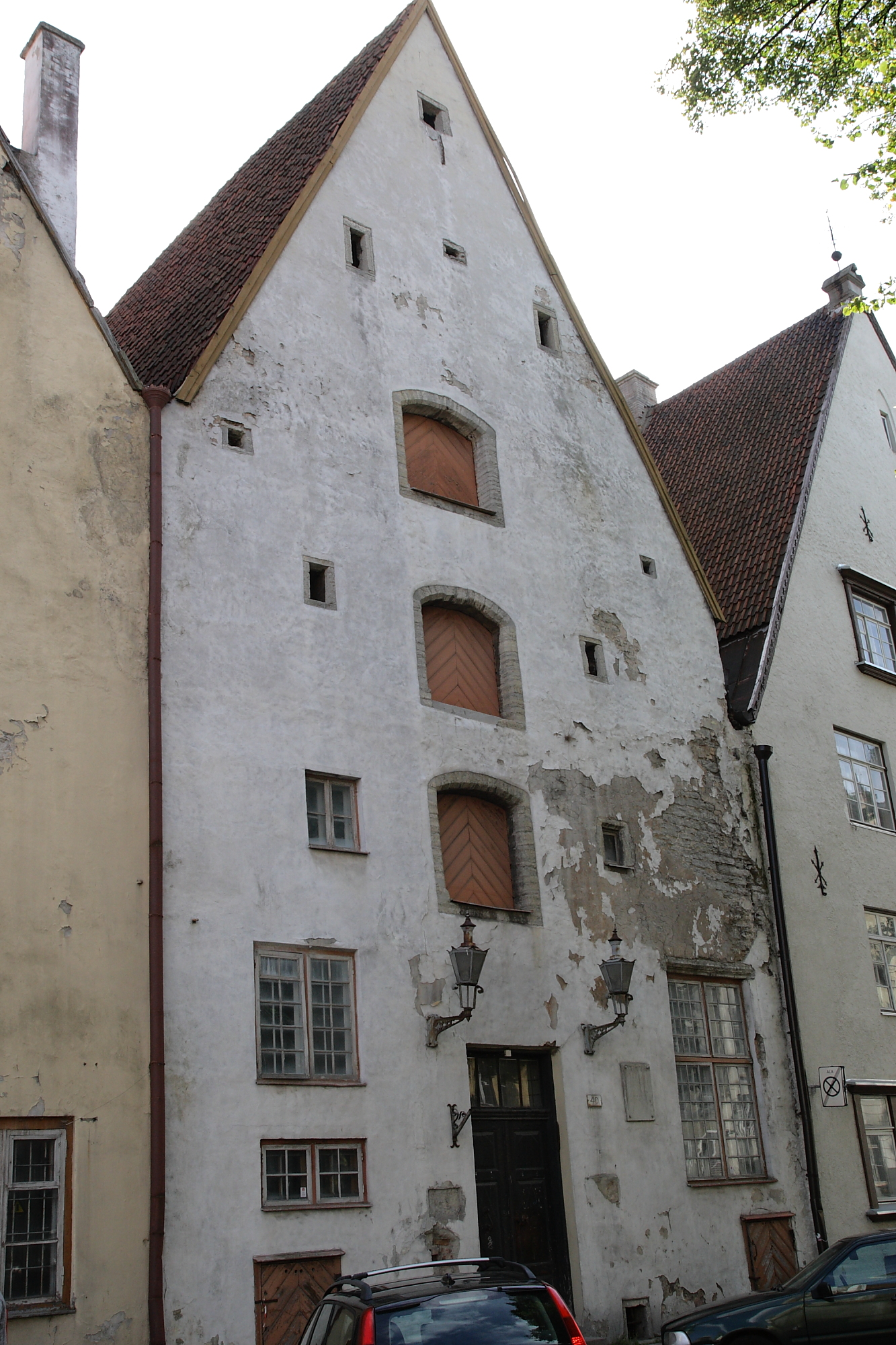 Tallinn, elamu Lai 40 värava- ja hoovihoonega, 15.-19.saj